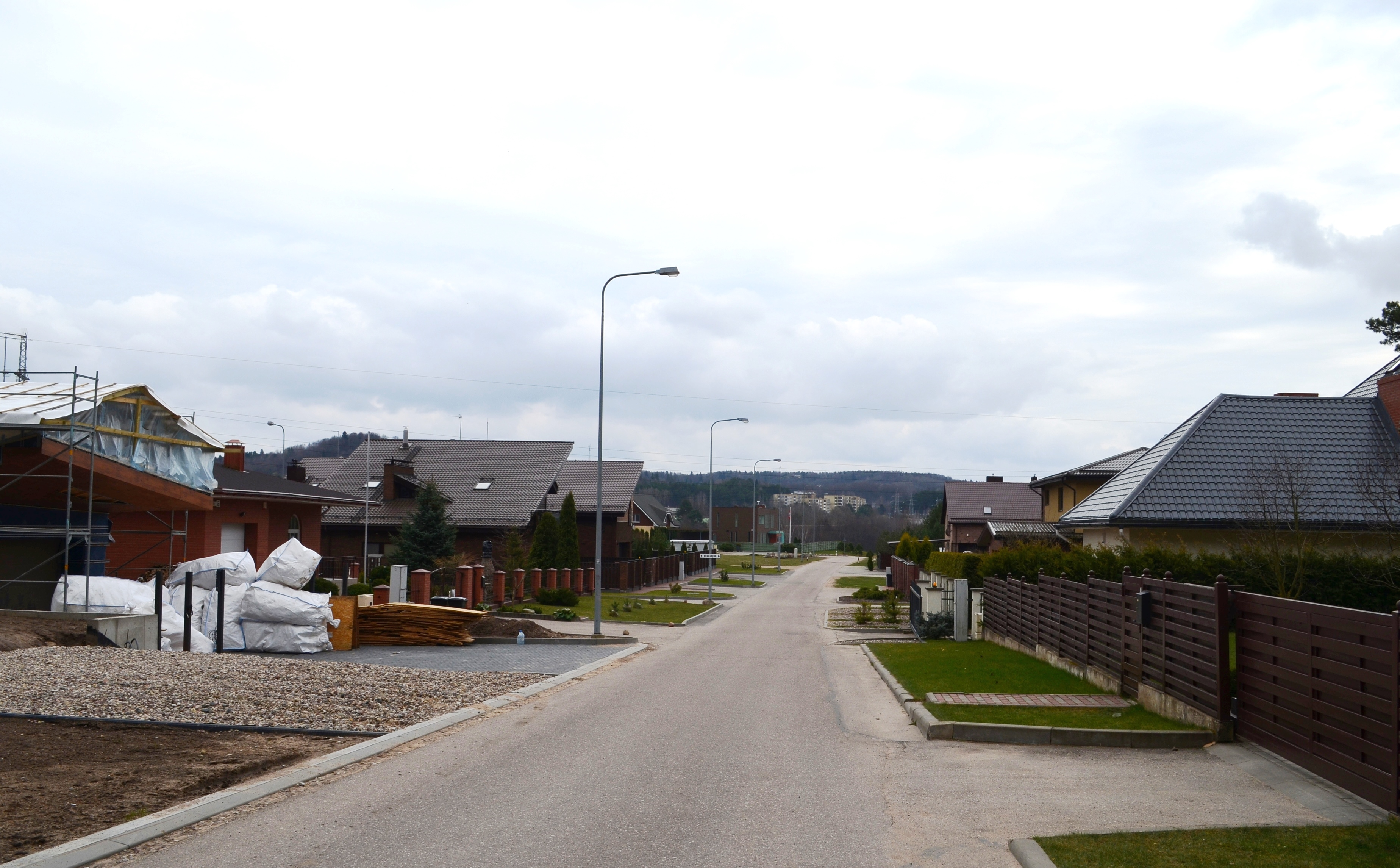 Upėtakių g. Bukčiuose, Vilnius